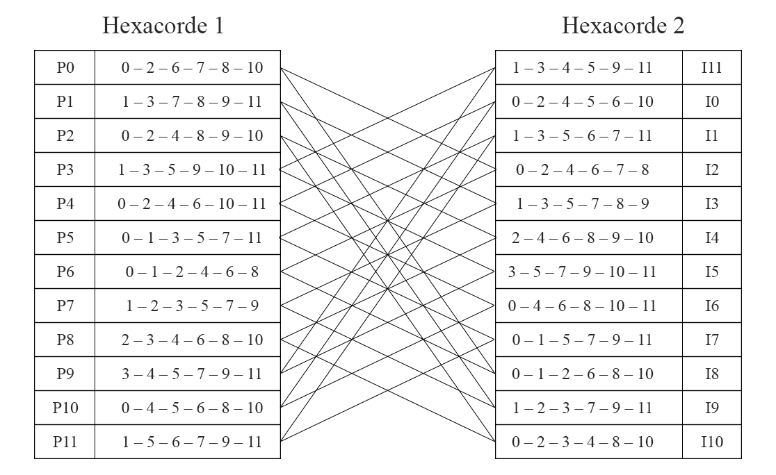 Relación entre hexacordes en el Cuarteto n.1 de Gerhard